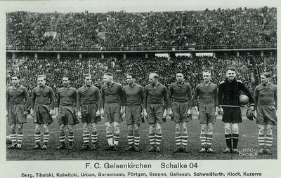 Alte Ansichtskarte, gestempelt ist diese 1937, vom FC Schalke 04.